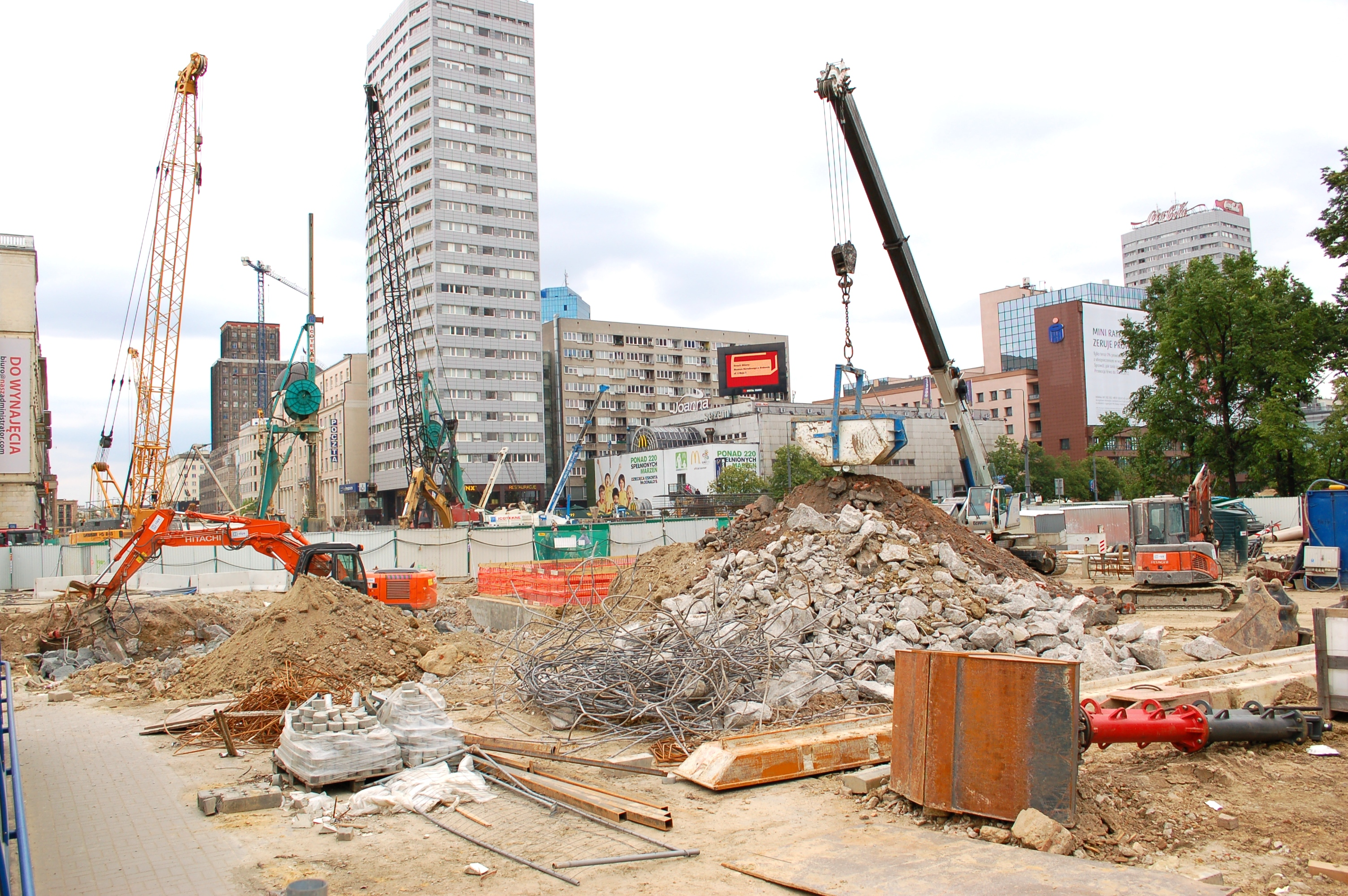 Metrobaustelle Warschau, Kreuzung Świętokrzyska/Marszałkowska